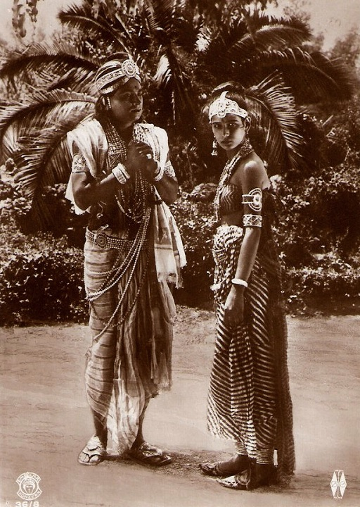 Himansu Rai et Seeta Devi dans une scène de Prem Sanyas (1925)